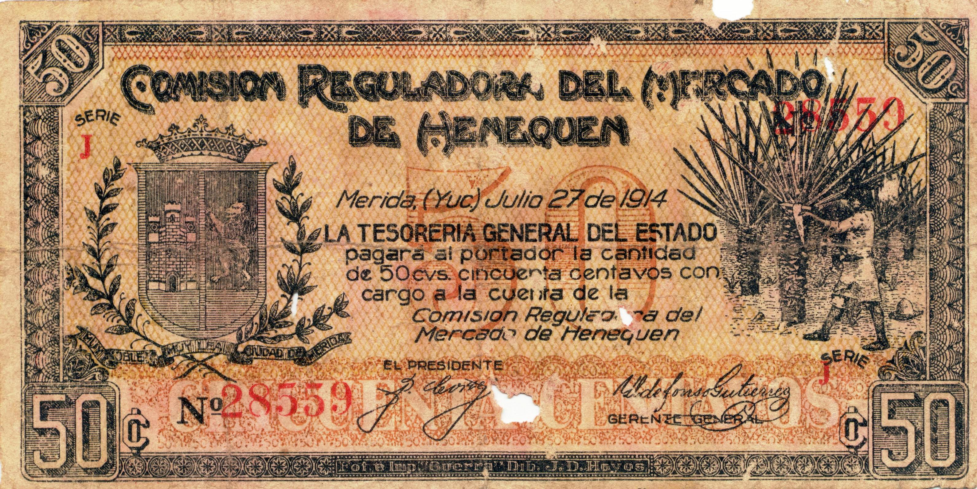 Billete que emitió el general golpista Abel Ortiz Argumedo en 1914 para "respaldar" los fondos con los que exaccionó a los industriales del henequén durante su breve mandato.